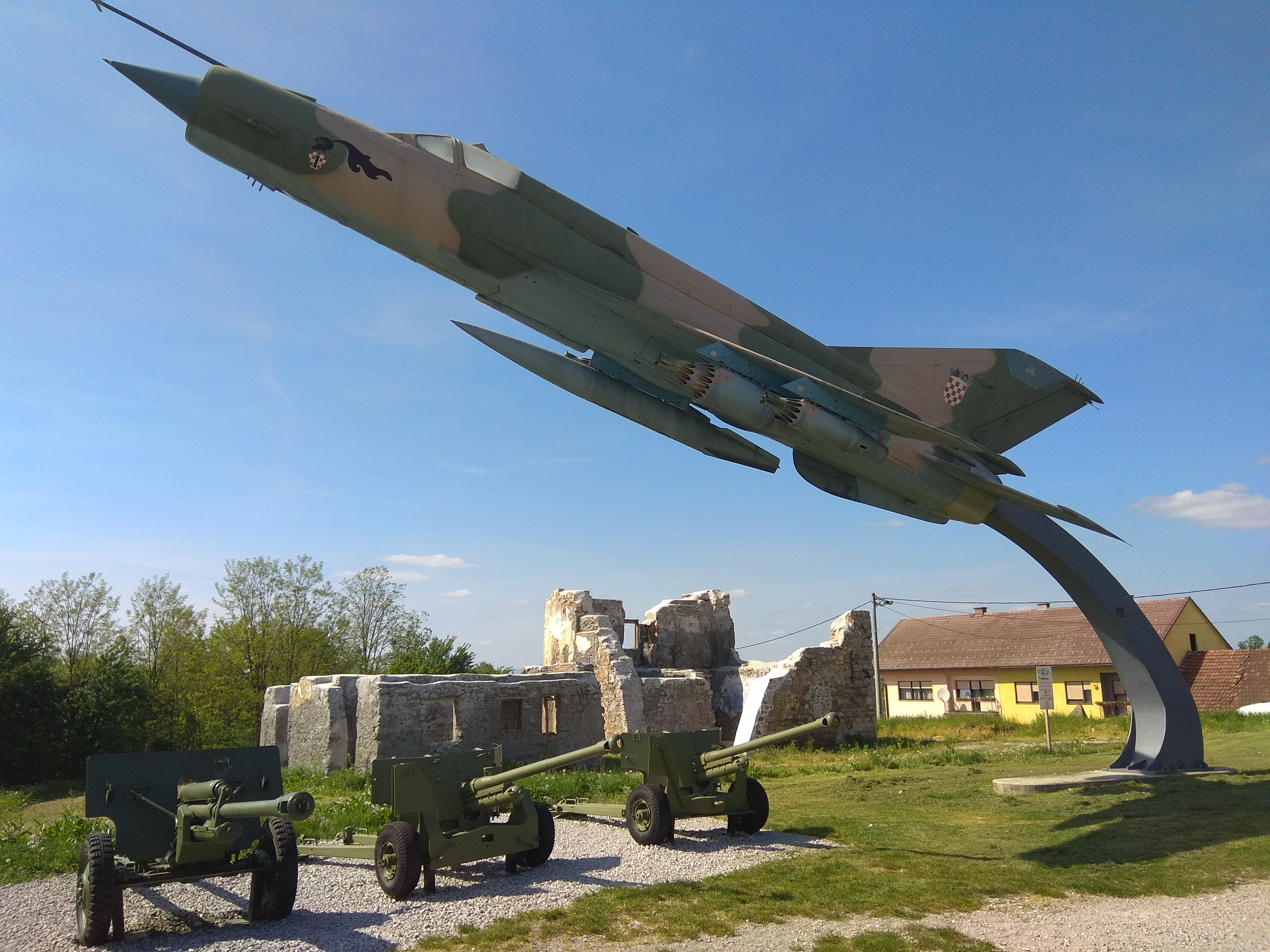 מוזיאון המוקדש למלחמת העצמאות של קרואטיה בעיר קרלובץ